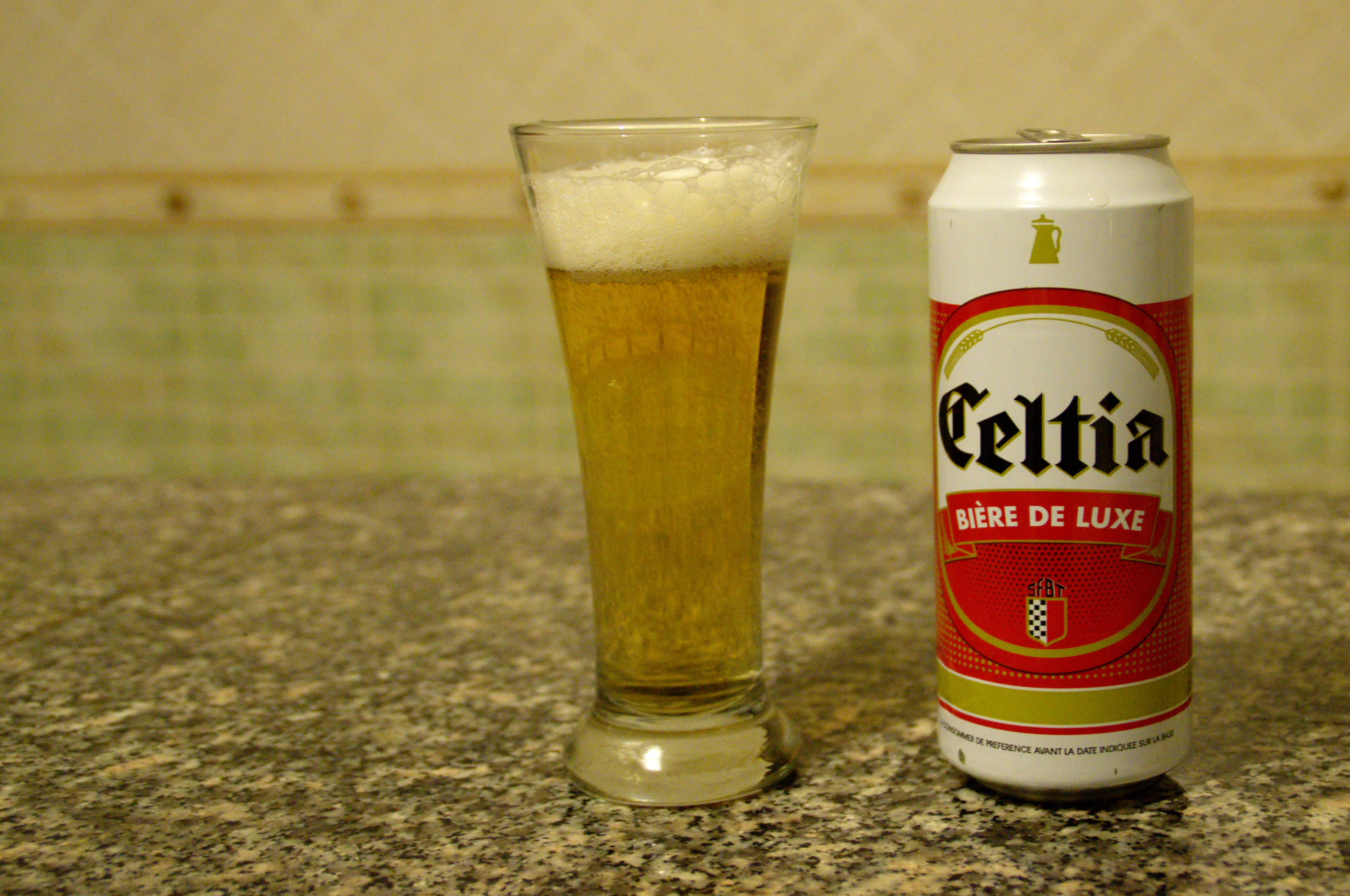 Canette et verre de bière de la marque Celtia, tunisienne